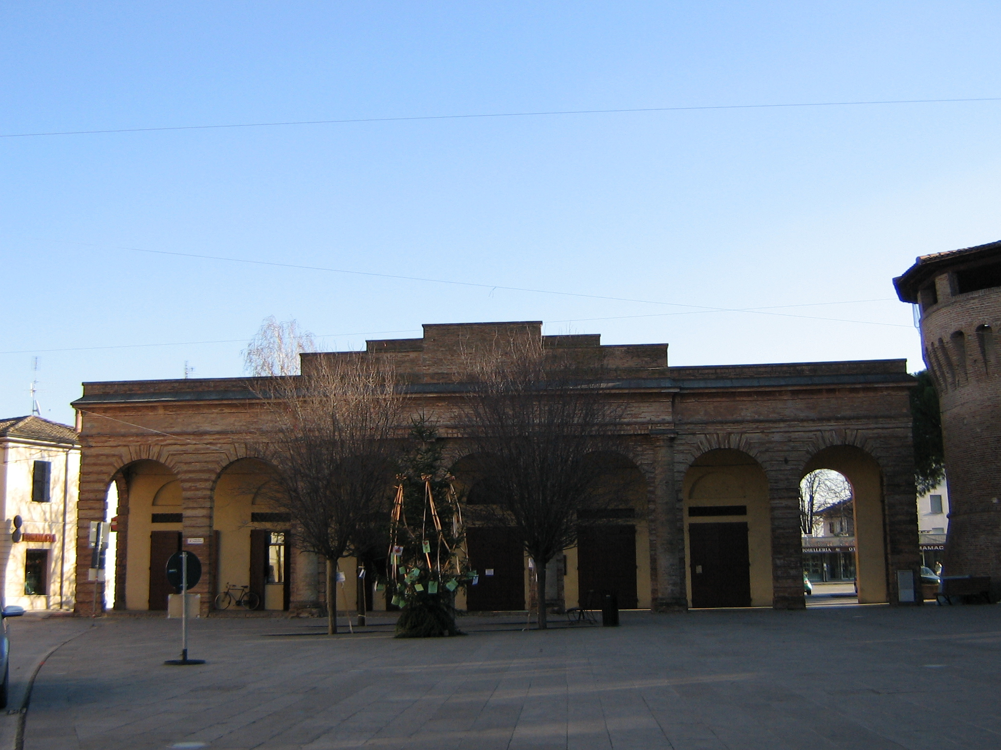 Porta, Forlimpopoli (FC), Italy